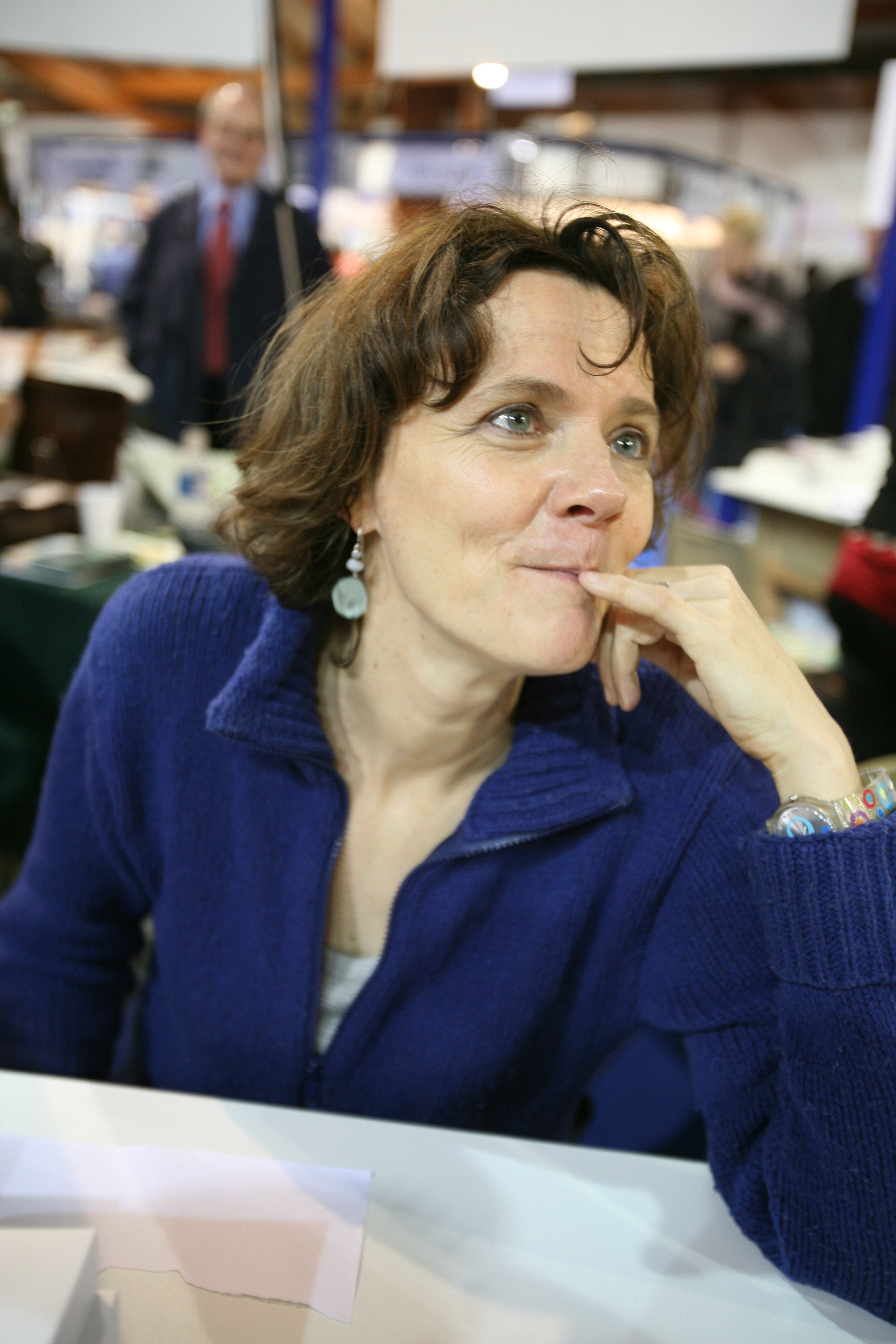 Florence Aubenas dédicace son livre sur l'« Affaire d'Outreau » à la Foire du Livre de Brive le 6 novembre 2005. Auteur : Oscar J. Marianez (Photo personnelle de l'auteur)